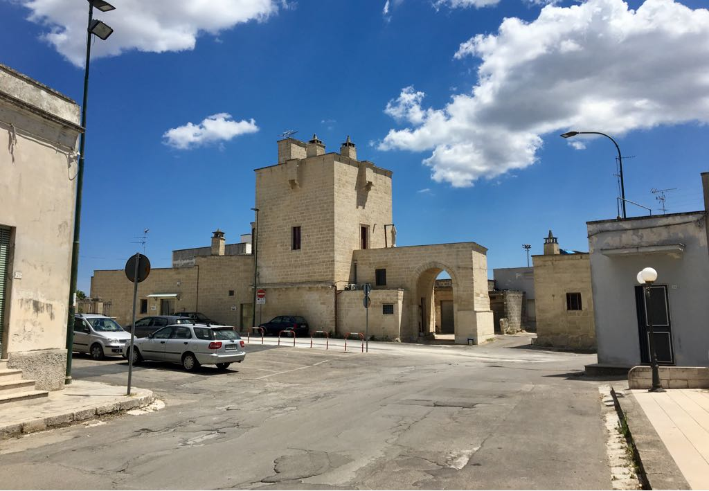 Torre Linciano - Merine (tipica abitazione fortificata con ballatoio)